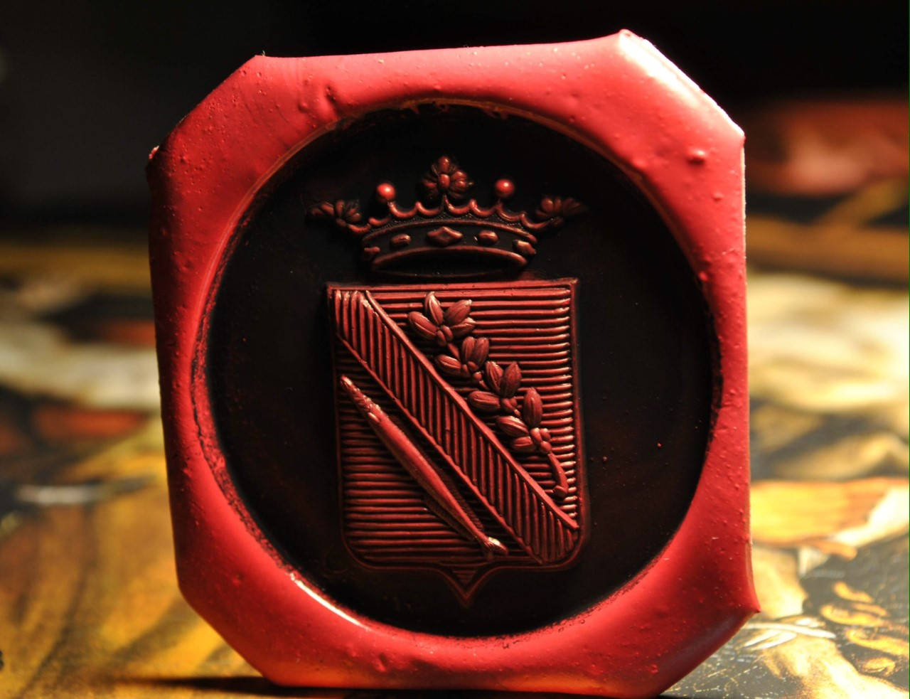 Sceau des armes de la famille Ciciarelli de Cicerello, en cire à cacheter